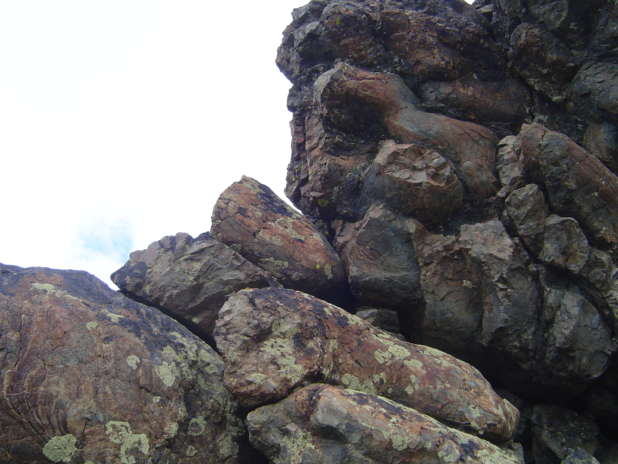 Pillow lava (lave en coussin) en haut du Chenaillet dans les Alpes, ce sont des basaltes faciès des schistes verts